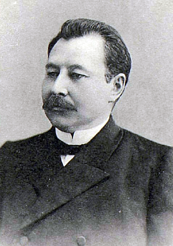 Гайса Хамидуллович Еникеев (вариант имени Айса[1], фамилии — Еникиев[2]; 2 июля 1864, Оренбургская губерния — март 1931, Уфа) — учитель, просветитель, этнограф, депутат III и IV Государственной думы от Казанской и Оренбургской губерний (1907—1917).